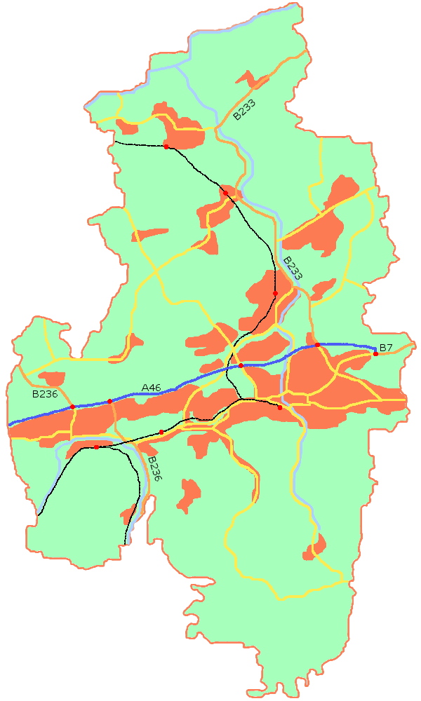 Verkehrsnetz in Iserlohn: hellblau=Flüsse,Bäche -- blau=Autobahn -- orange=Bundesstraße -- gelb=Landes-/Kreisstraße -- schwarz=Eisenbahn -- rote Punkte=Autobahnanschluss,Bahnhof/Haltepunkt